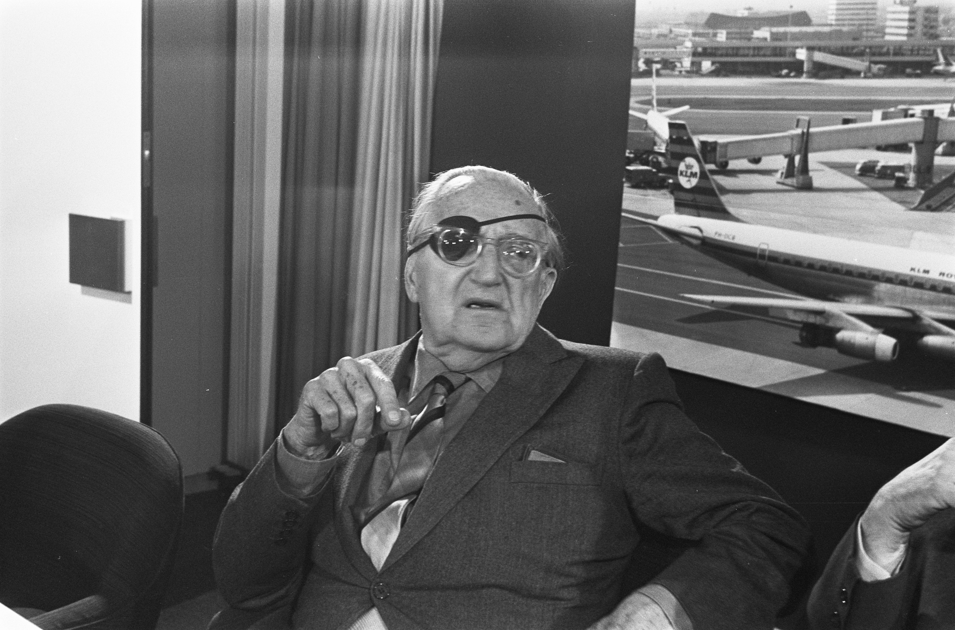 Collectie / Archief : Fotocollectie Anefo Reportage / Serie : [ onbekend ] Beschrijving : Filmregisseurs Fritz Lang ( 79 jaar ) arriveert op Schiphol, kop Datum : 10 april 1969 Trefwoorden : FILMREGISSEURS Persoonsnaam : Fritz Lang Fotograaf : Evers, Joost / Anefo Auteursrechthebbende : Nationaal Archief Materiaalsoort : Negatief (zwart/wit) Nummer archiefinventaris : bekijk toegang 2.24.01.05 Bestanddeelnummer : 922-2843